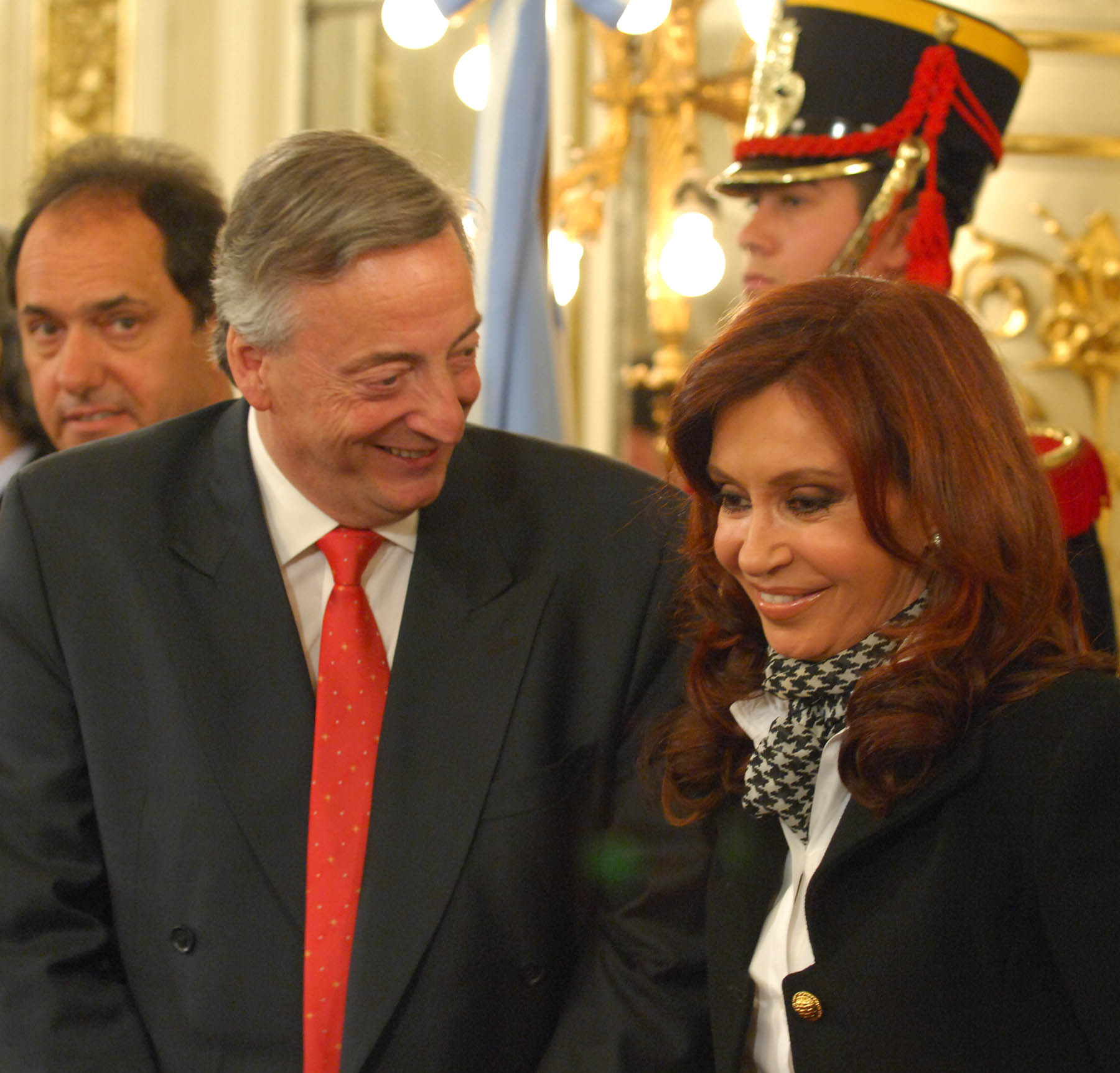 Casa Rosada, Salón Blanco - El presidente Kirchner junto a la senadora Cristina Fernández de Kirchner, en el acto de jura del ministro de Economía, Miguel Peirano, y del vicejefe de Gabinete, Jorge Rivas.